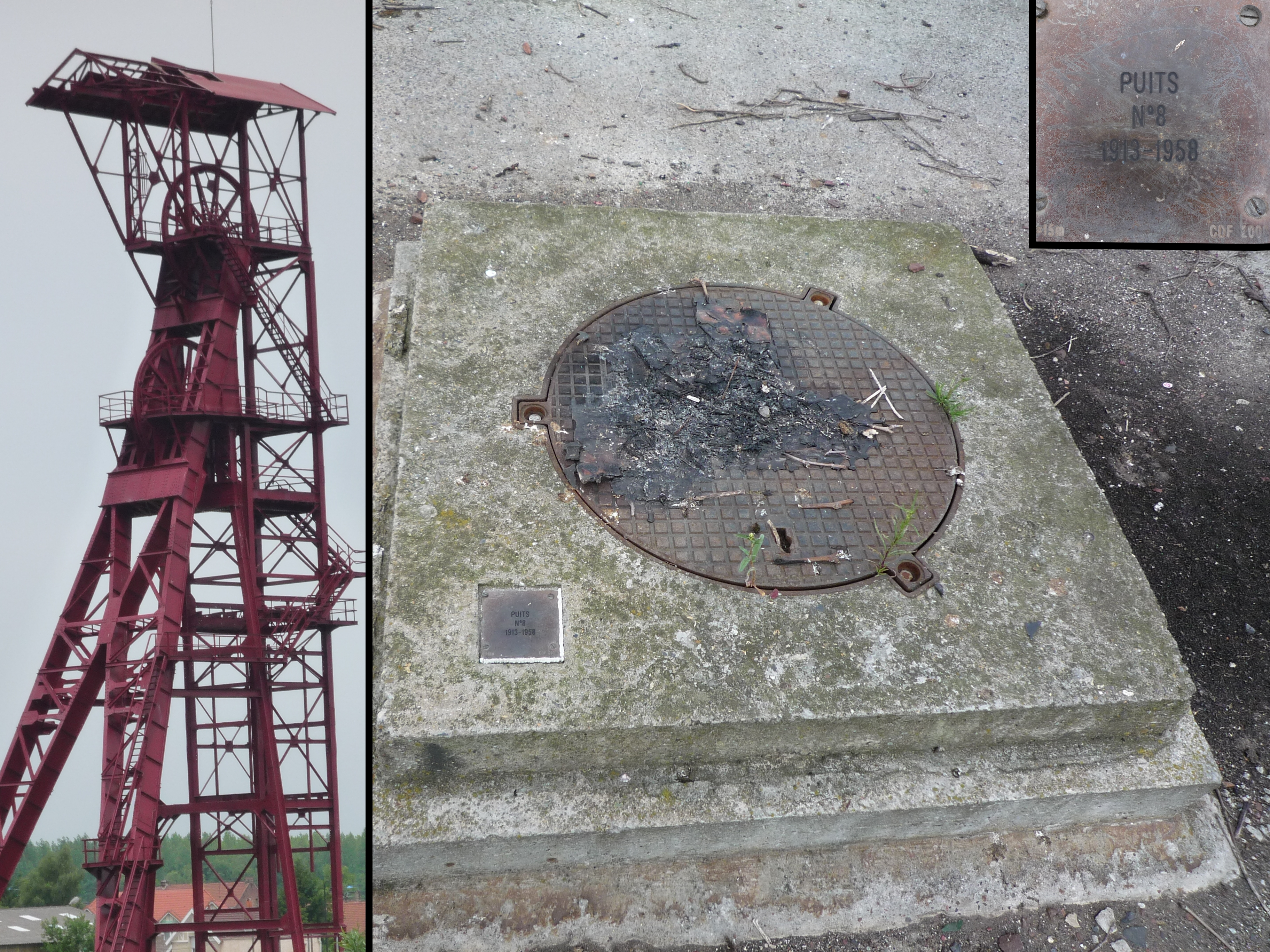 La fosse n° 8 - 8 bis de la Compagnie des mines de Dourges était un charbonnage du bassin minier du Nord-Pas-de-Calais constitué de deux puits situé à Évin-Malmaison, Pas-de-Calais, Nord-Pas-de-Calais, France.